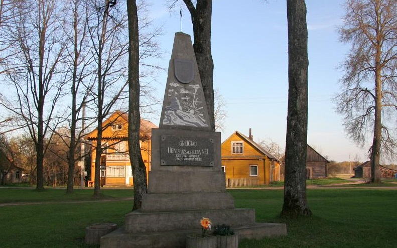 Paminklas Lietuvos nepriklausomybės dešimtmečiui